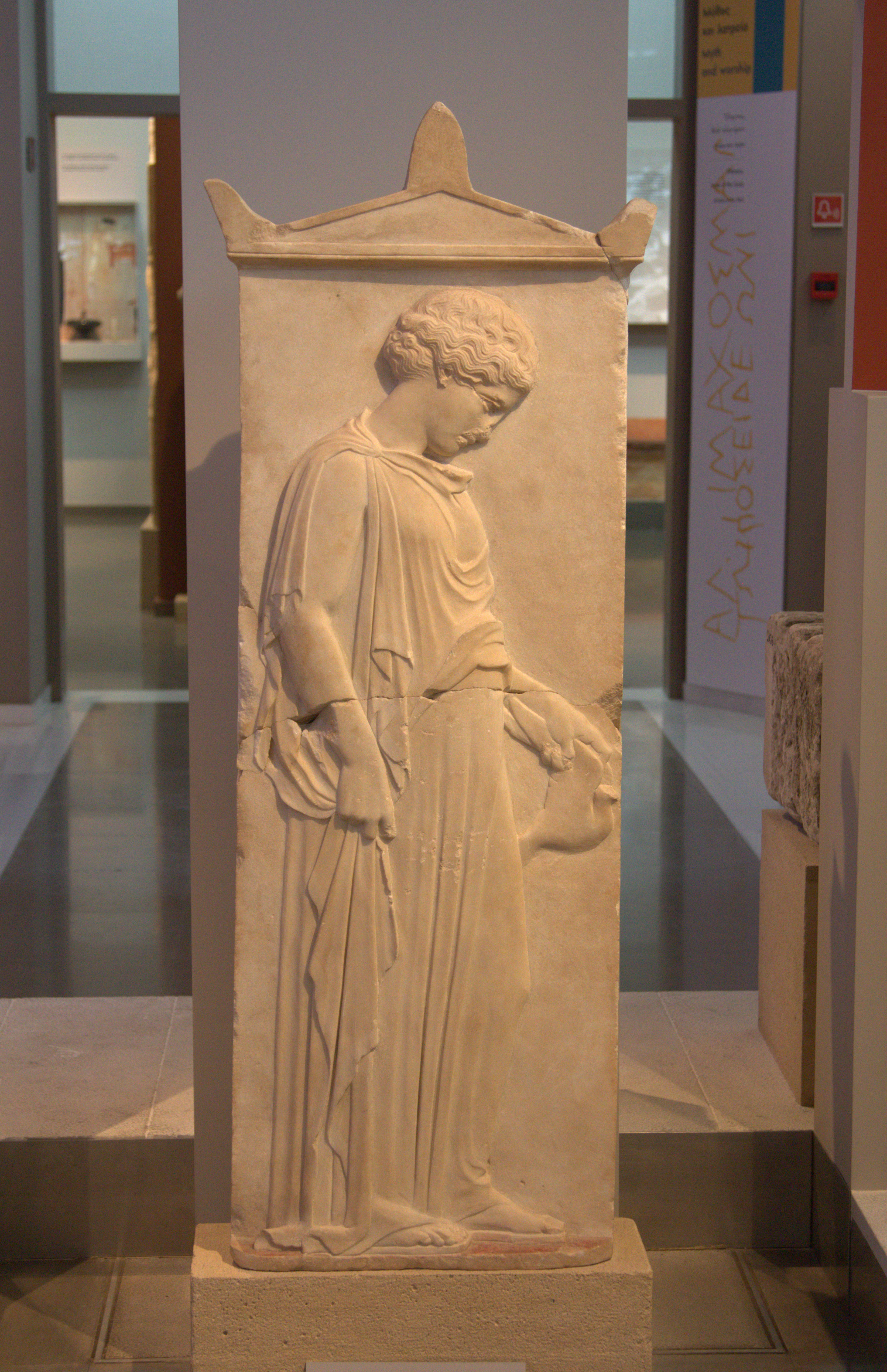 Kallikrateia, Chalkidiki, 440 B.C. Archaeological Museum of Thessaloniki, Greece. --- Επιτύμβια στήλη με παράσταση κόρης που κρατά περιστέρι. Καλλικράτεια Χαλκιδικής, 440 π.Χ. Αρχαιολογικό Μουσείο Θεσσαλονίκης.